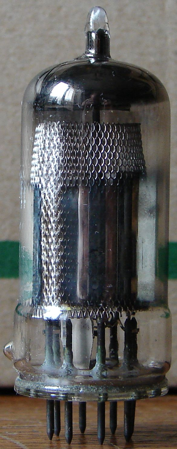 Röhre EF42 mit Innenverspiegelung